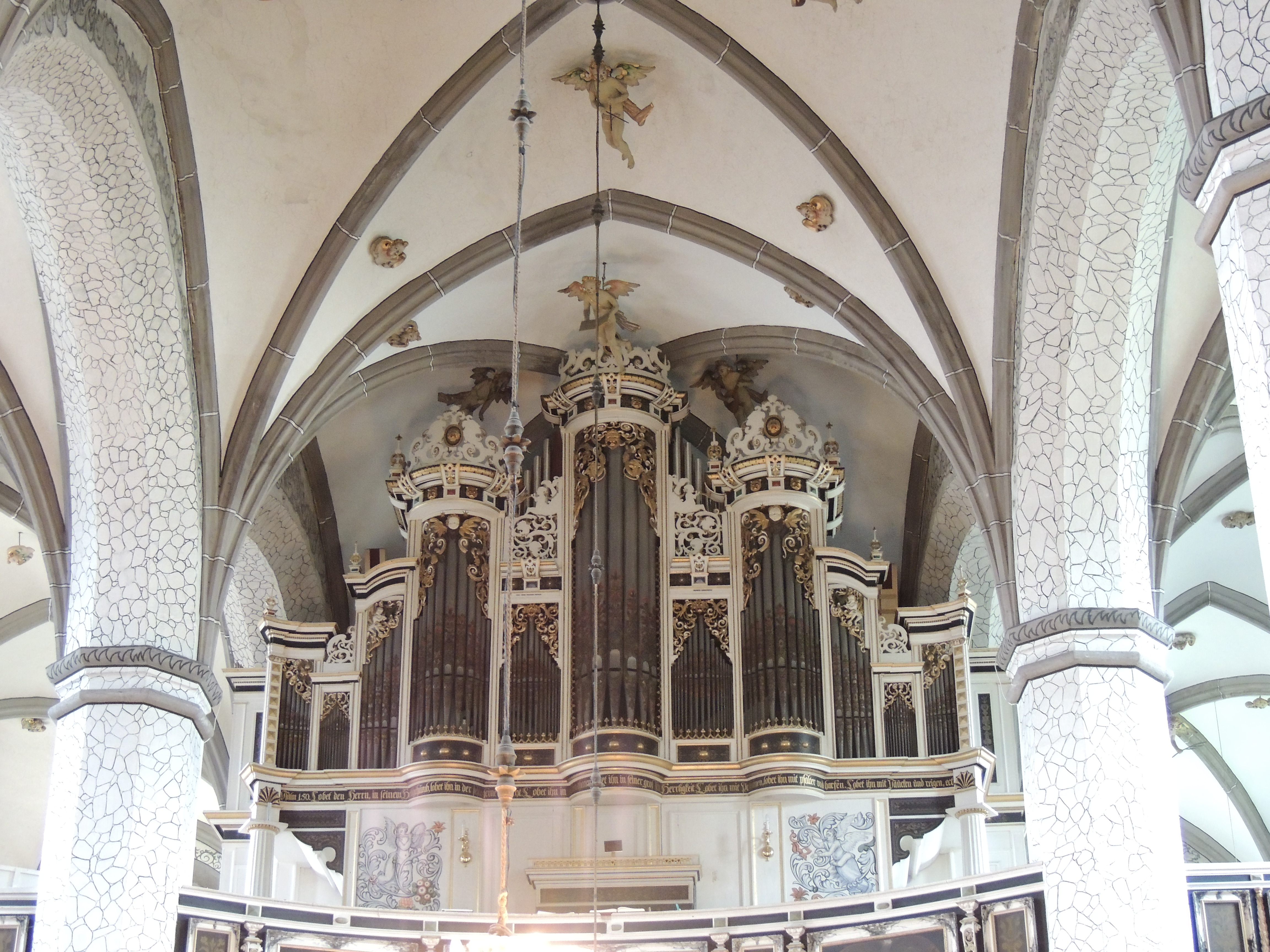 Stadtkirche St. Andreas in Rudolstadt, Innenansicht; Ladegast-Orgel